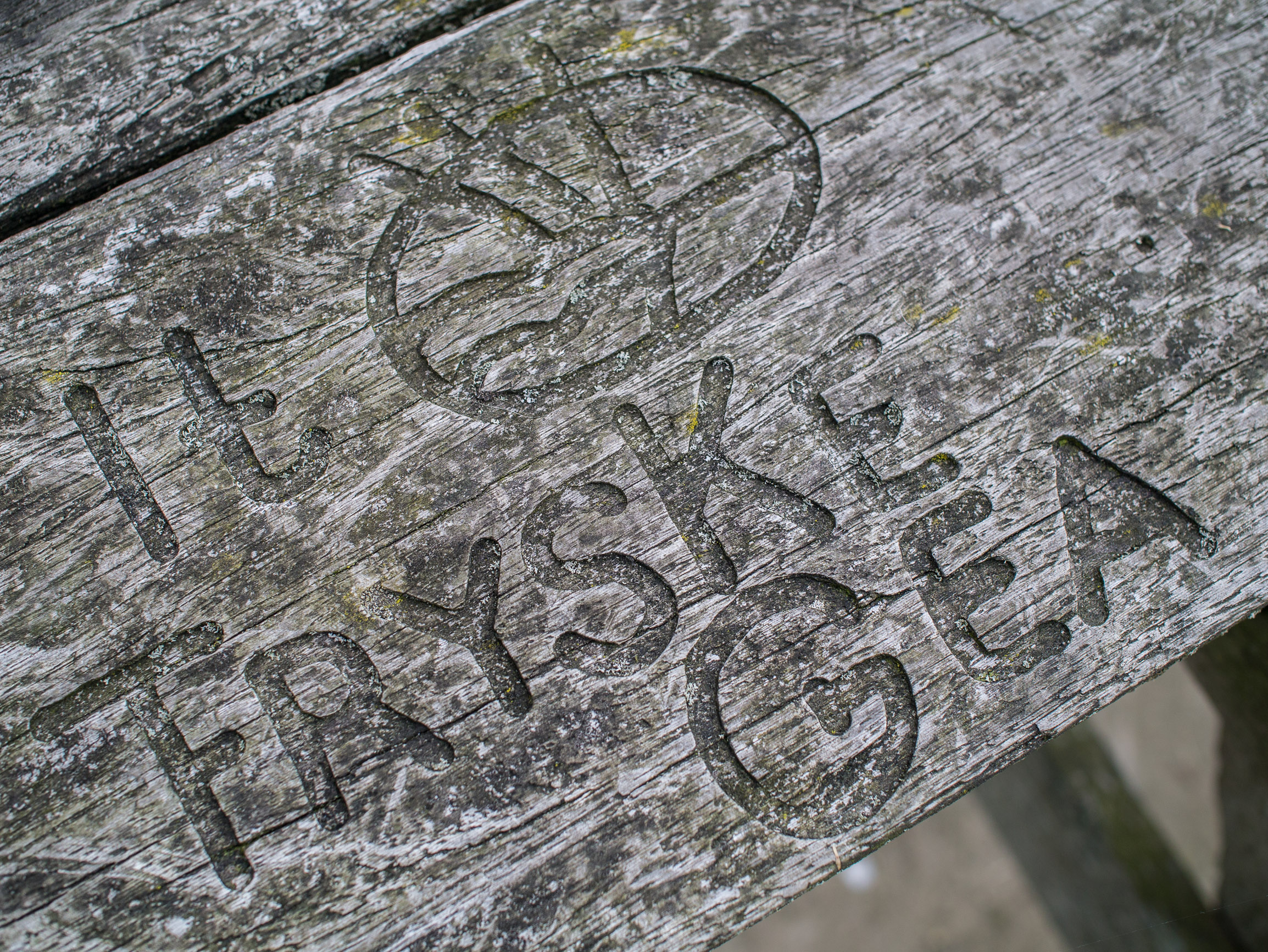 It Fryske Gea logo geëtst in houten bankje